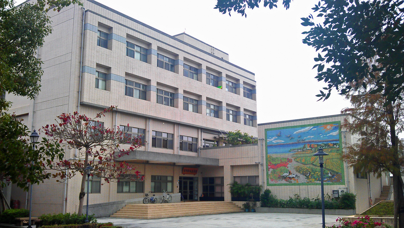 中文（台灣）: 行政院農業委員會農業試驗所台灣土壤陳列館